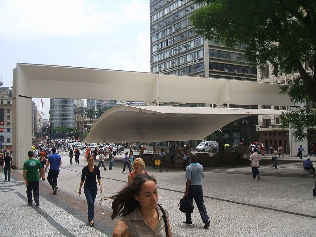 Pórtico de Paulo Mendes da Rocha na Praça do Patriarca, São Paulo, Brasil